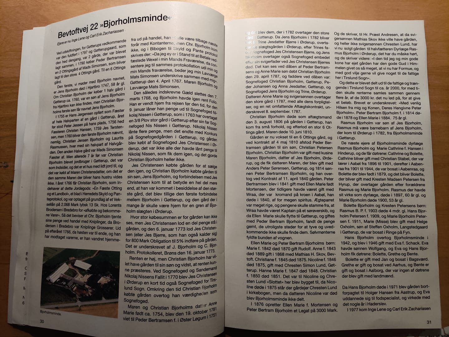 Historien fra år 1777, da det første spade-stik blev taget til Bjorholm-minde's bygninger. Og alle ejere af proprietær-gården bliver beskrevet her